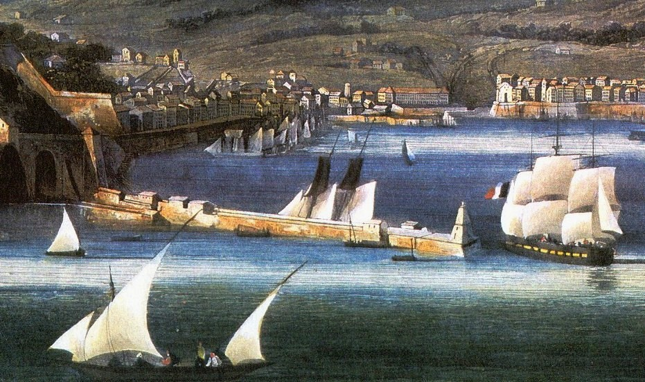 Veduta di Genova - 1810 circa (particolare sulle Tall Ship)